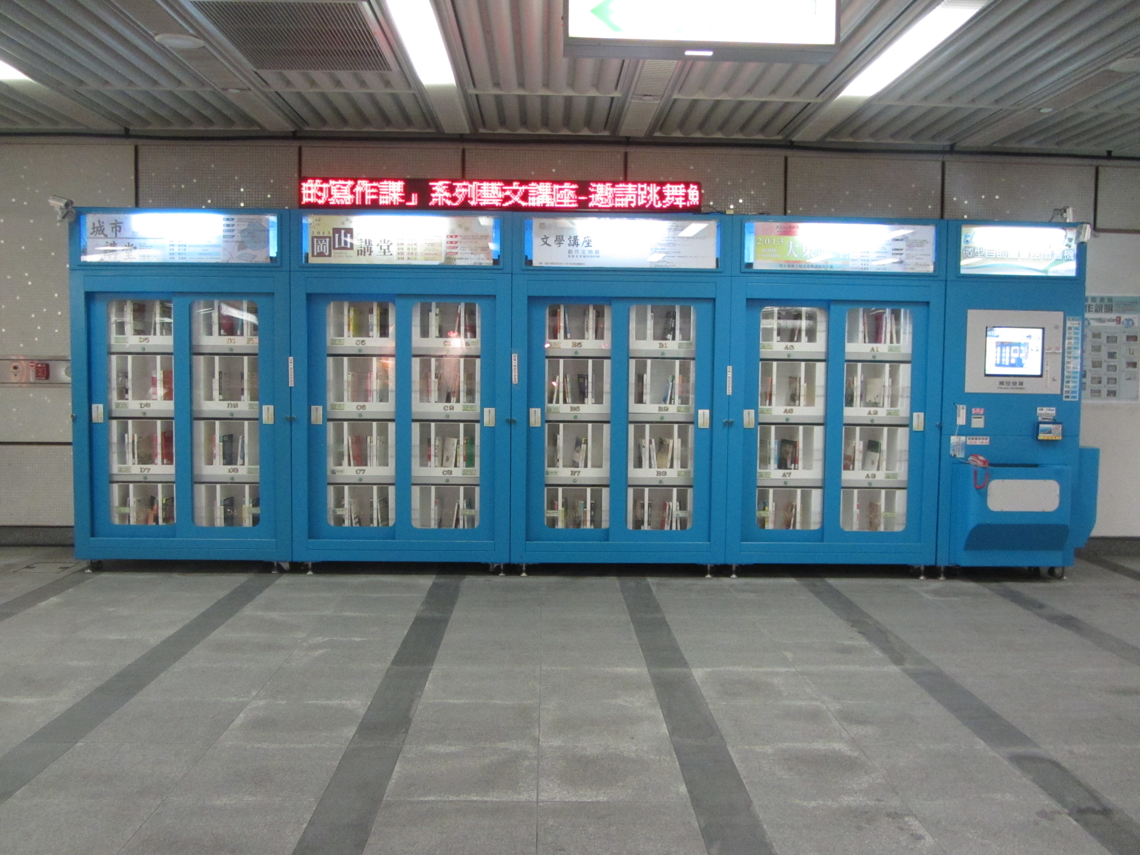 高雄市立圖書館設於高雄捷運中央公園站的微型自助圖書館借書機